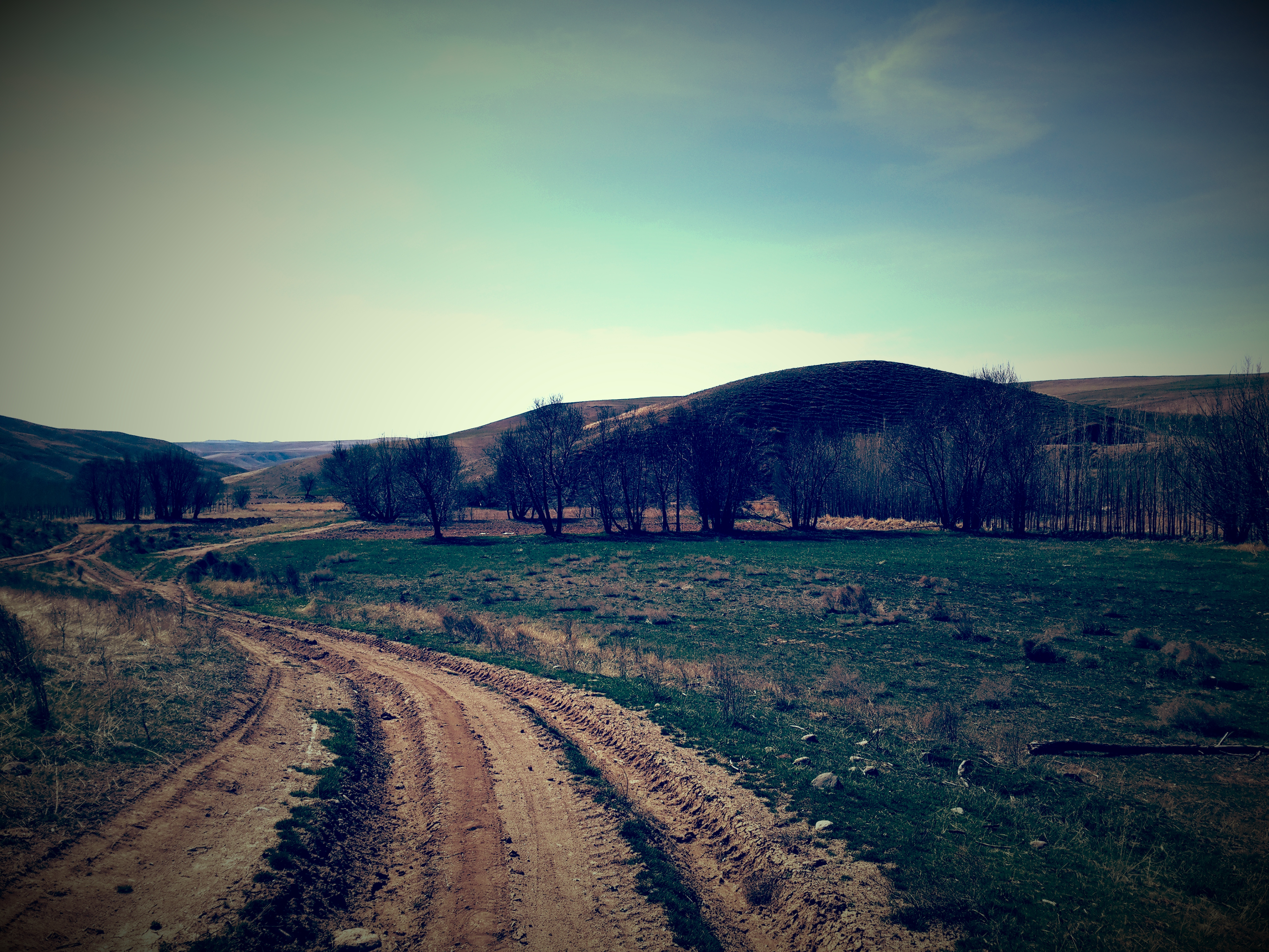 روستای قوپوز